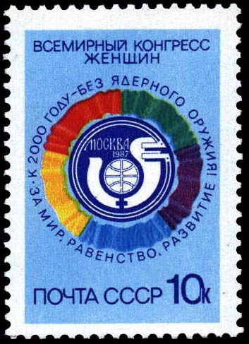 Почтовая марка СССР, выпущенная 23 июня 1987 года и посвящённая Всемирному конгрессу женщин, проходившему с 23 по 27 июня 1987 года в Москве. На марке изображена эмблема конгресса, обрамлённая разноцветными праздничными флагами, символизирующими пять континентов Земли, а также девиз конгресса: «К 2000 году — без ядерного оружия! За мир, равенство, развитие!». Художник — А. Плетнев. Номер (ЦФА) — 5842. Тираж — 2,3 млн экз.